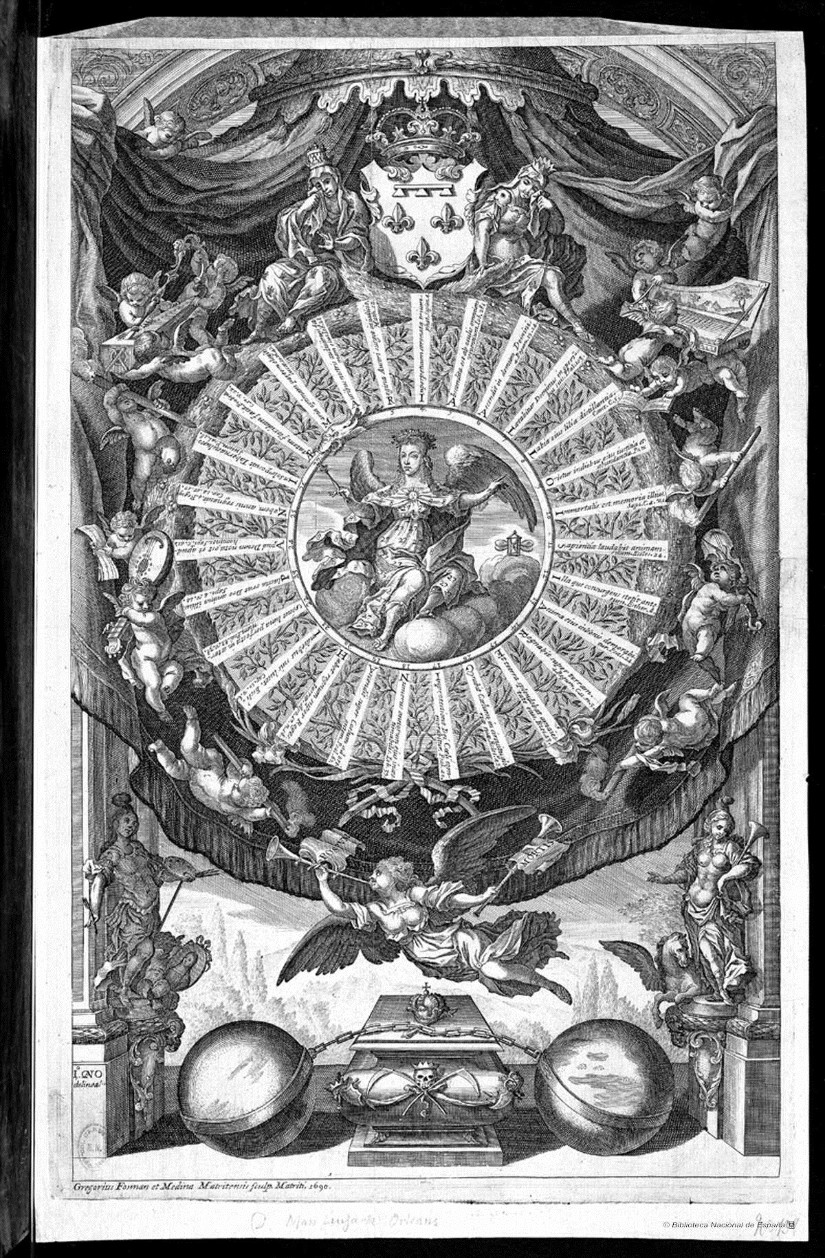 Jeroglífico alegórico en honor de la reina María Luisa de Orleans, esposa de Carlos II, grabado por Gregorio Fosman y Medina (fl. 1653-1713) inserto en la "Noticias historiales de la enfermedad, muerte, y exsequias de la esclarecida Reyna de las Españas Doña María Luisa de Orleans…", por Juan de Vera Tassis y Villarroel, impreso en Madrid por Francisco Sanz, 1690.